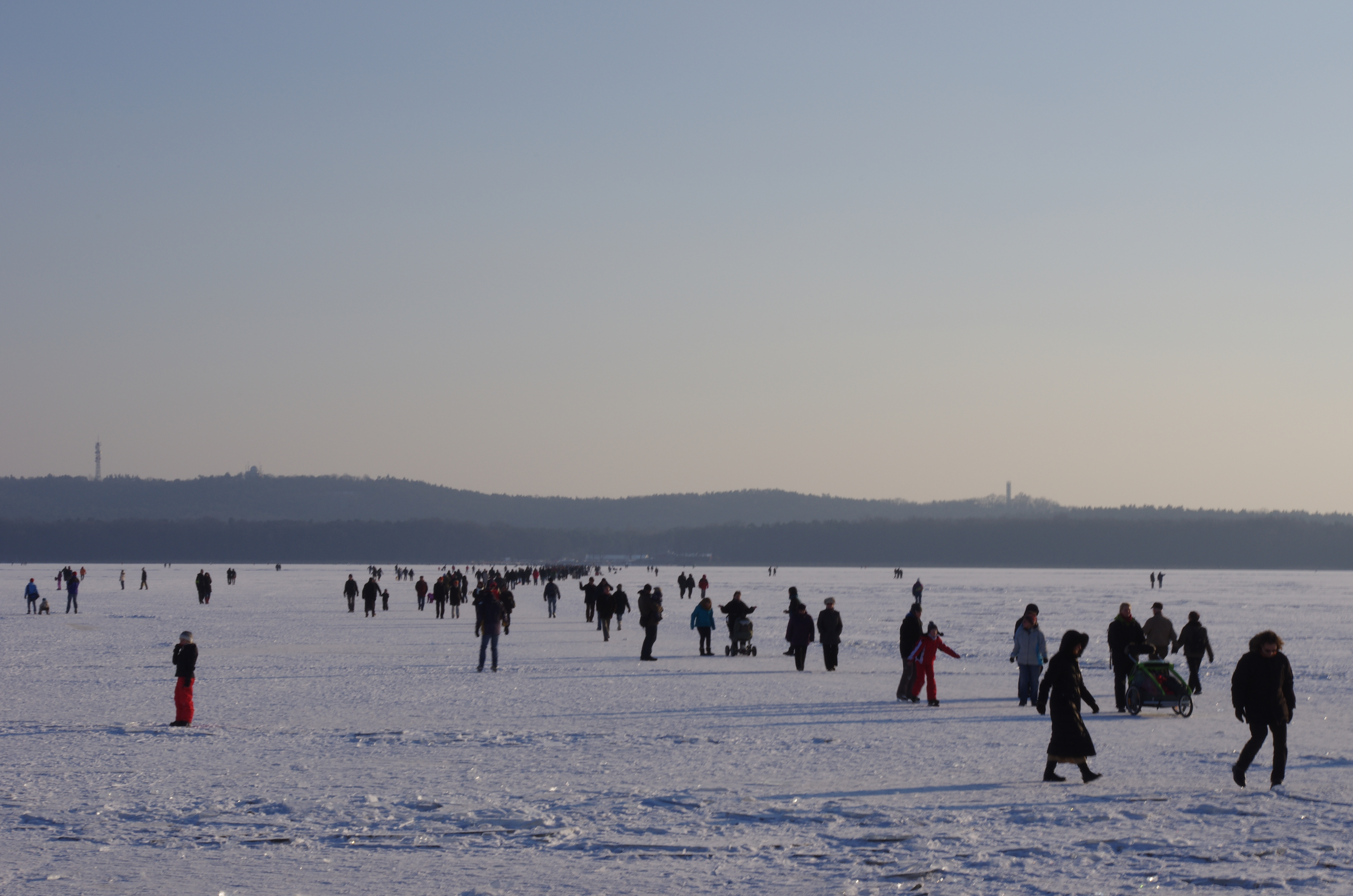 Friedrichshagen in Berlin. Der Müggelsee von Friedrichshagen aus mit Meschen, die über den gefrorenen See laufen.